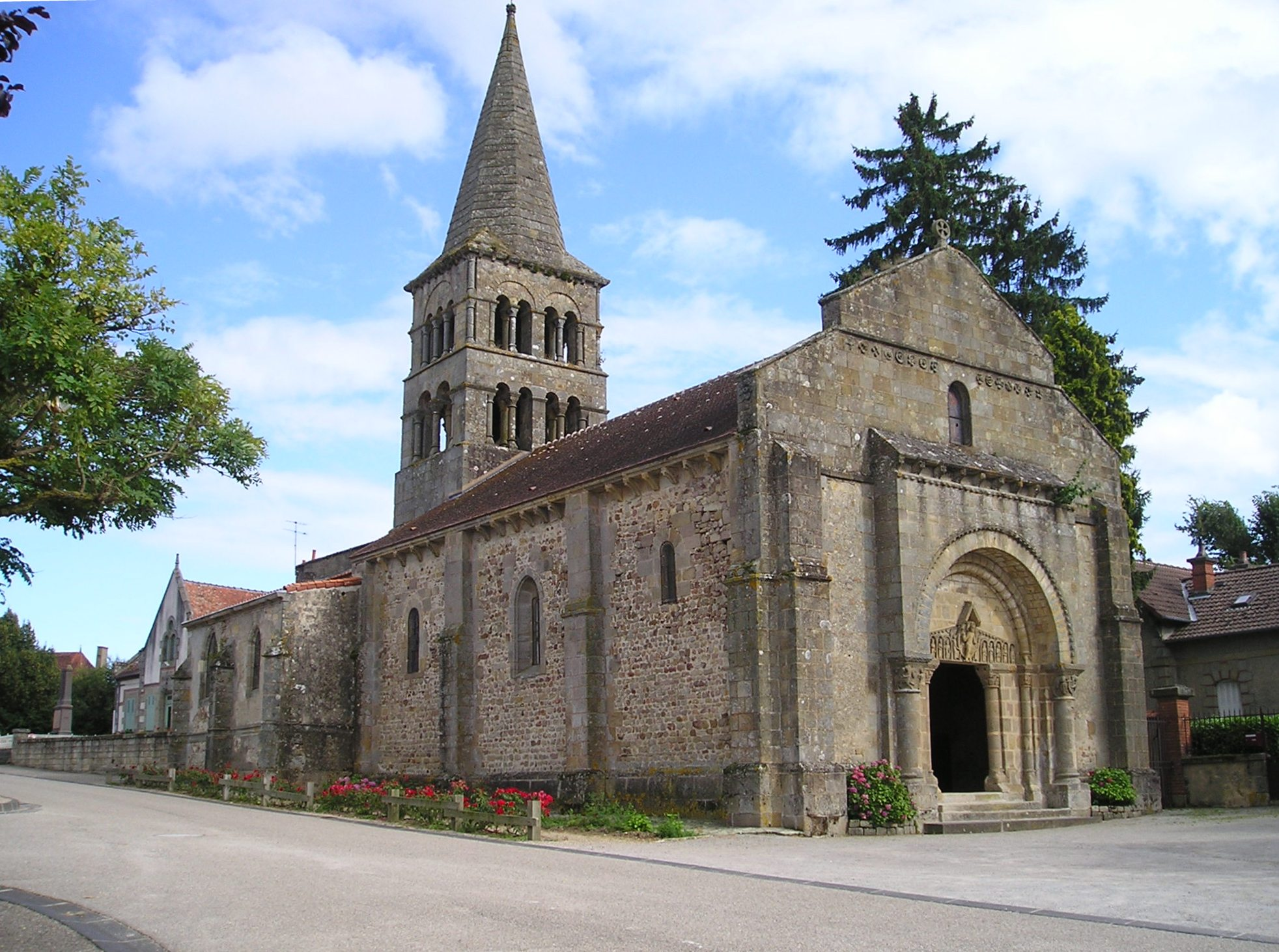 Meillers, Kirche Saint-Julien